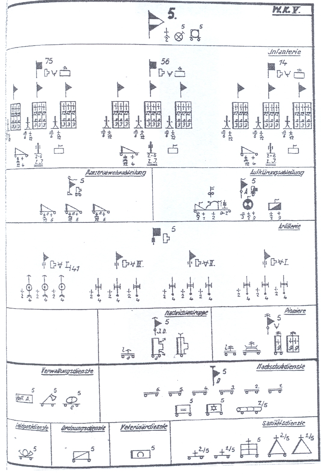 Gliederung der 5. Infanterie-Divivsion der Wehrmacht 1940